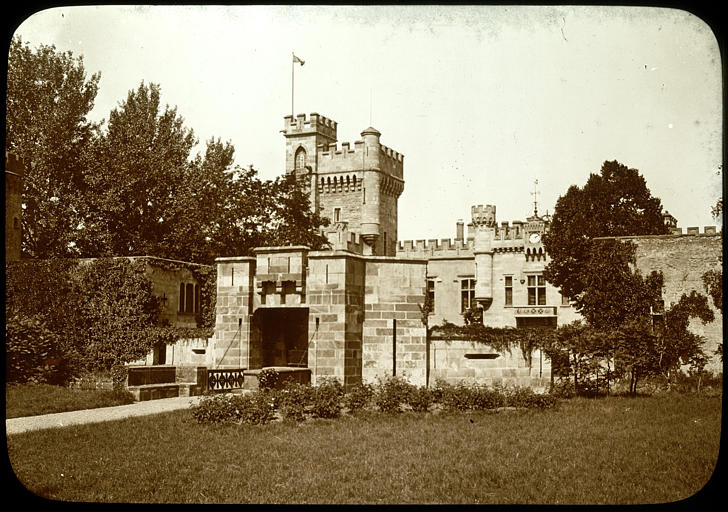 Vue du château de la Grangefort